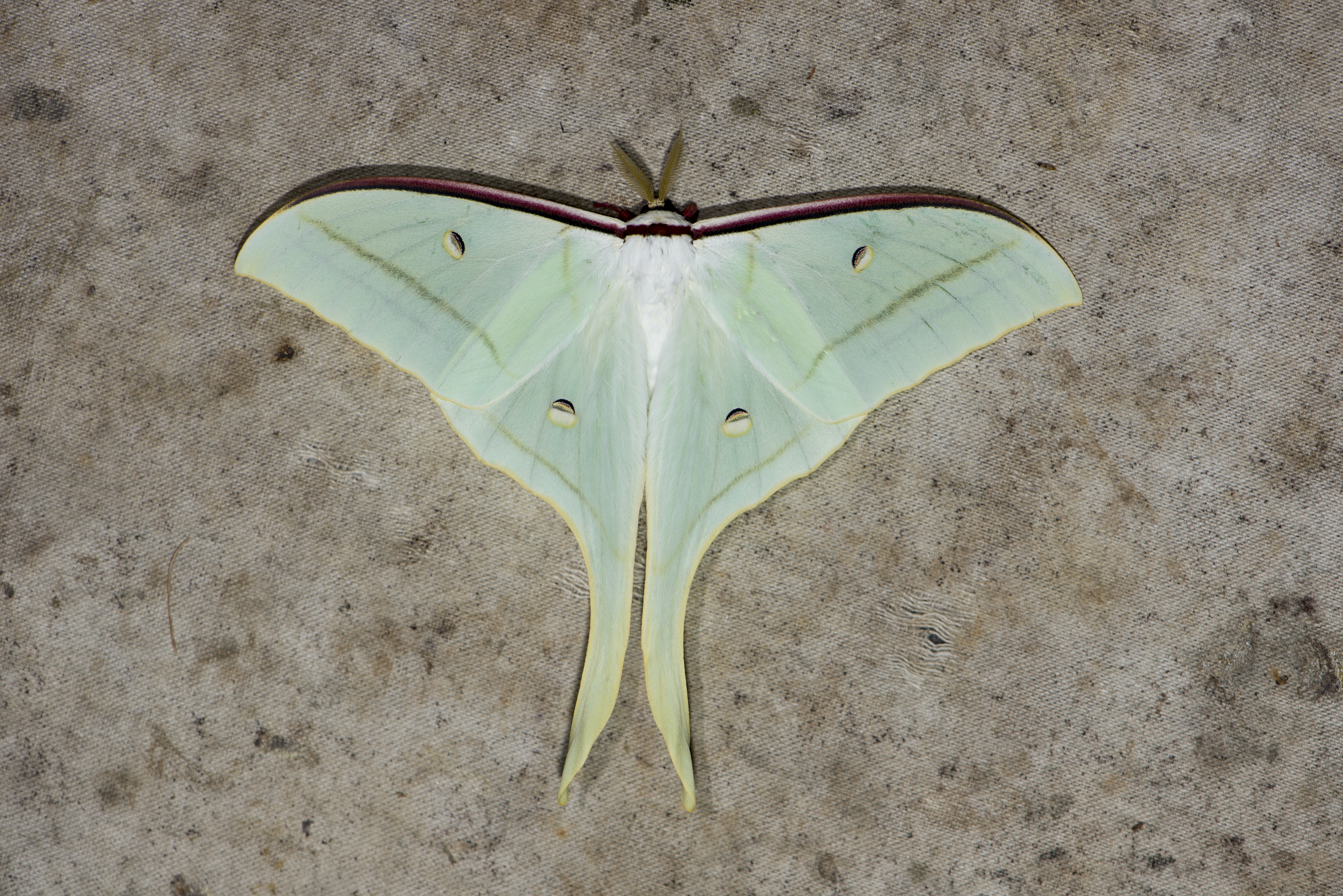 _ESH4362 Actias ningpoana ningtaiwana